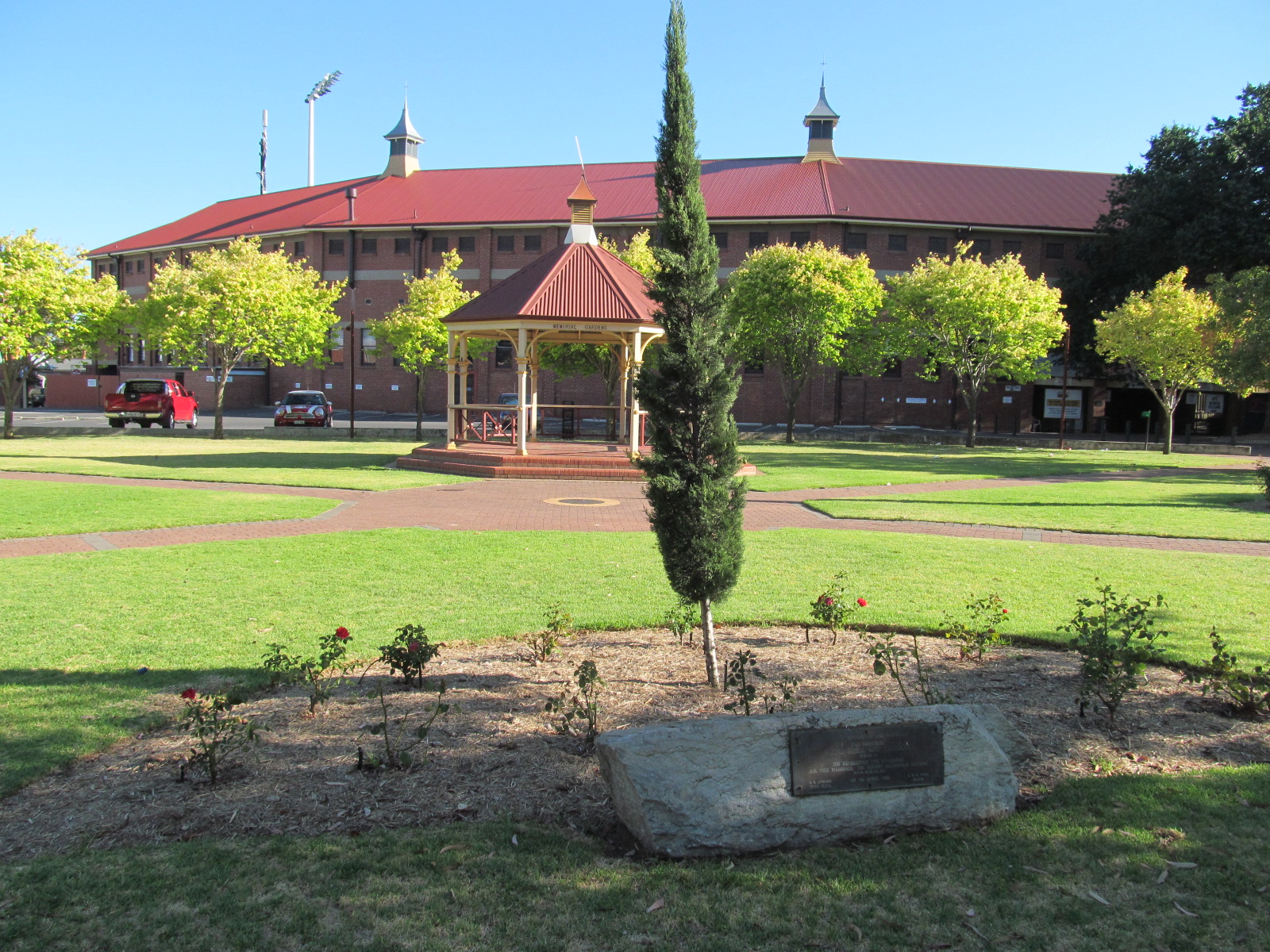 Norwood Oval, Norwood, Adelaide.